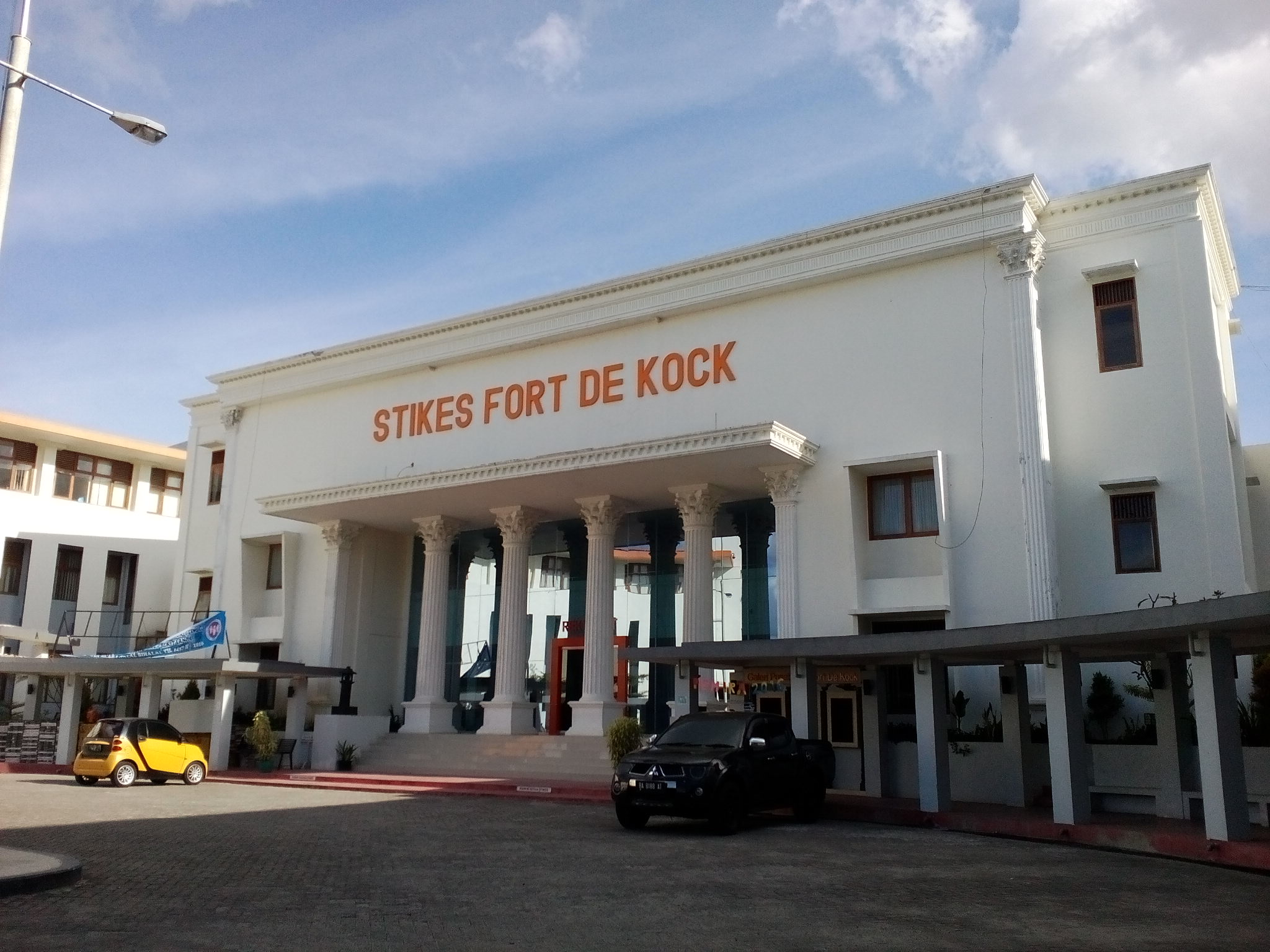 STIKES FdK